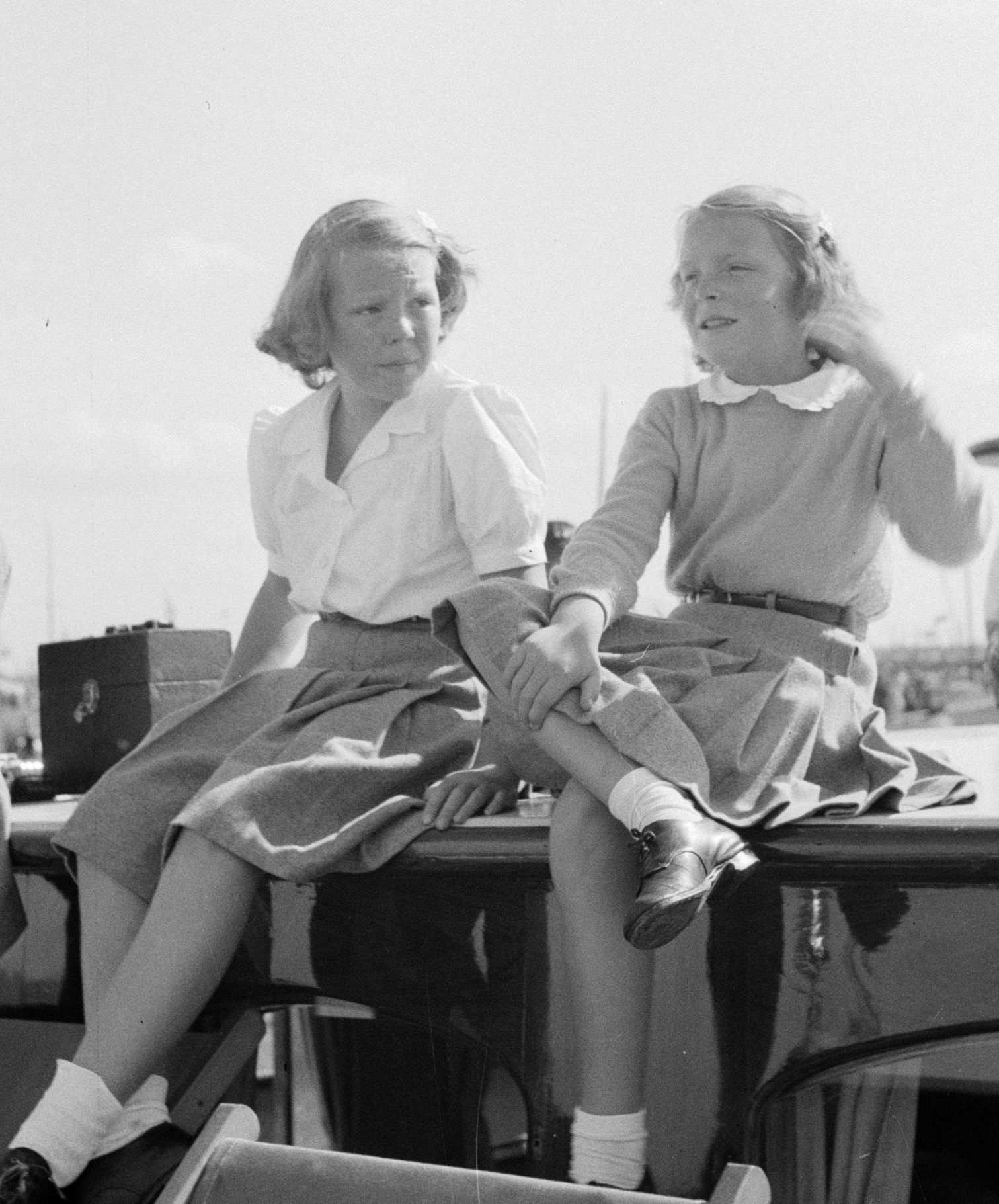 Collectie / Archief : Fotocollectie Van de Poll Reportage / Serie : De koninklijke familie aan boord van het koninklijk jacht de Piet Hein Beschrijving : Prinses Beatrix, prinses Irene en prinses Juliana kijken naar voorbij varende schepen; daarachter prinses Margriet Datum : 1946 Trefwoorden : koninklijk huis, prinsessen, schepen Persoonsnaam : Beatrix (prinses Nederland), Irene (prinses Nederland), Juliana (prinses Nederland), Margriet (prinses Nederland) Fotograaf : Poll, Willem van de Auteursrechthebbende : Nationaal Archief Materiaalsoort : Negatief (zwart/wit) Nummer archiefinventaris : bekijk toegang 2.24.14.02 Bestanddeelnummer : 255-7629